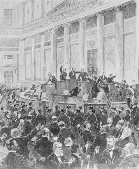 Policejní zásah v poslanecké sněmovně rakouské Říšské rady, 25. listopadu 1897; publikováno v Leipziger Illustrierte Zeitung, 1897-12-09, s. 799